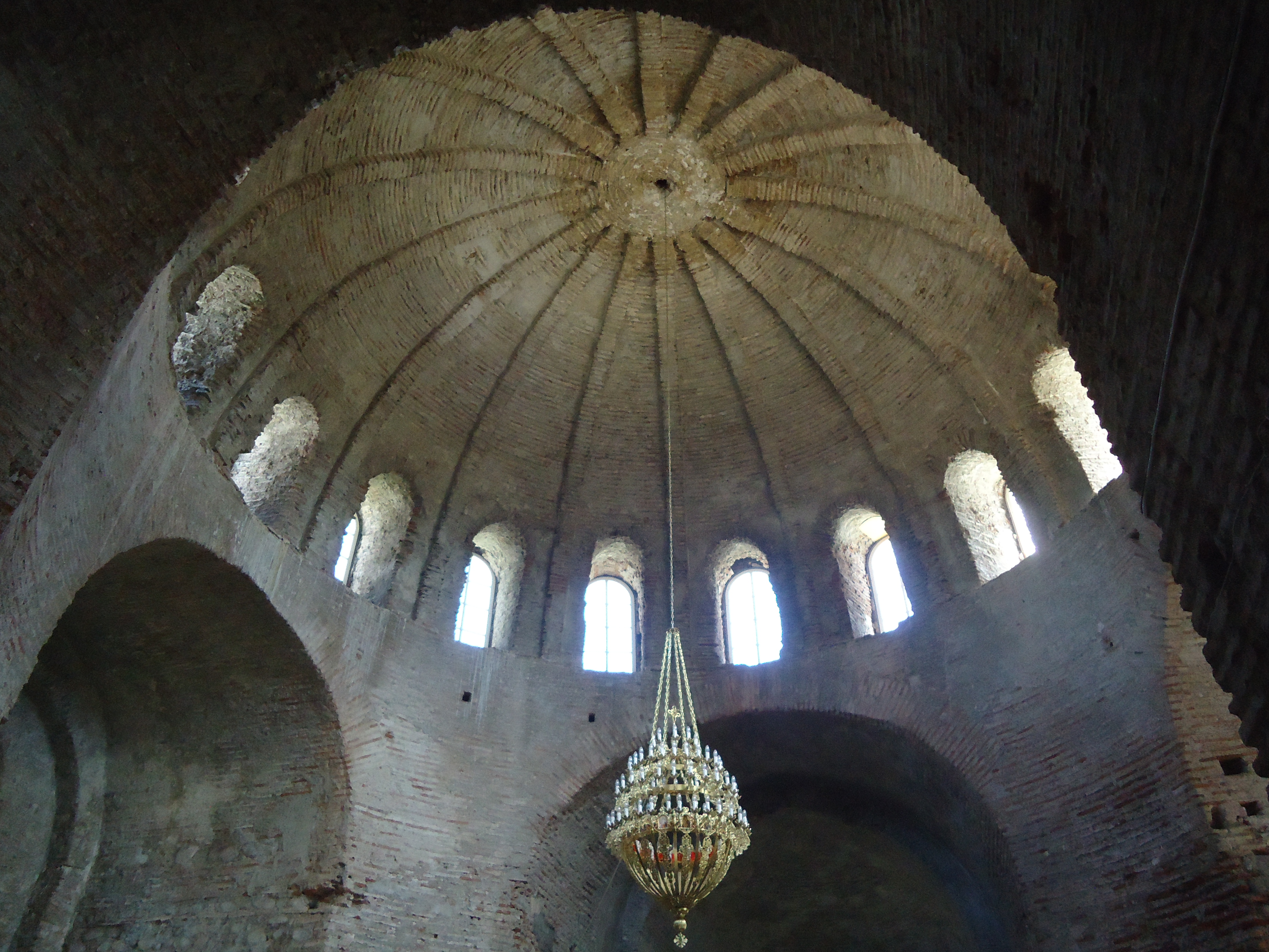 Купол Драндской церкви VI век